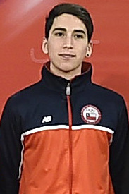 Gobierno de Chile